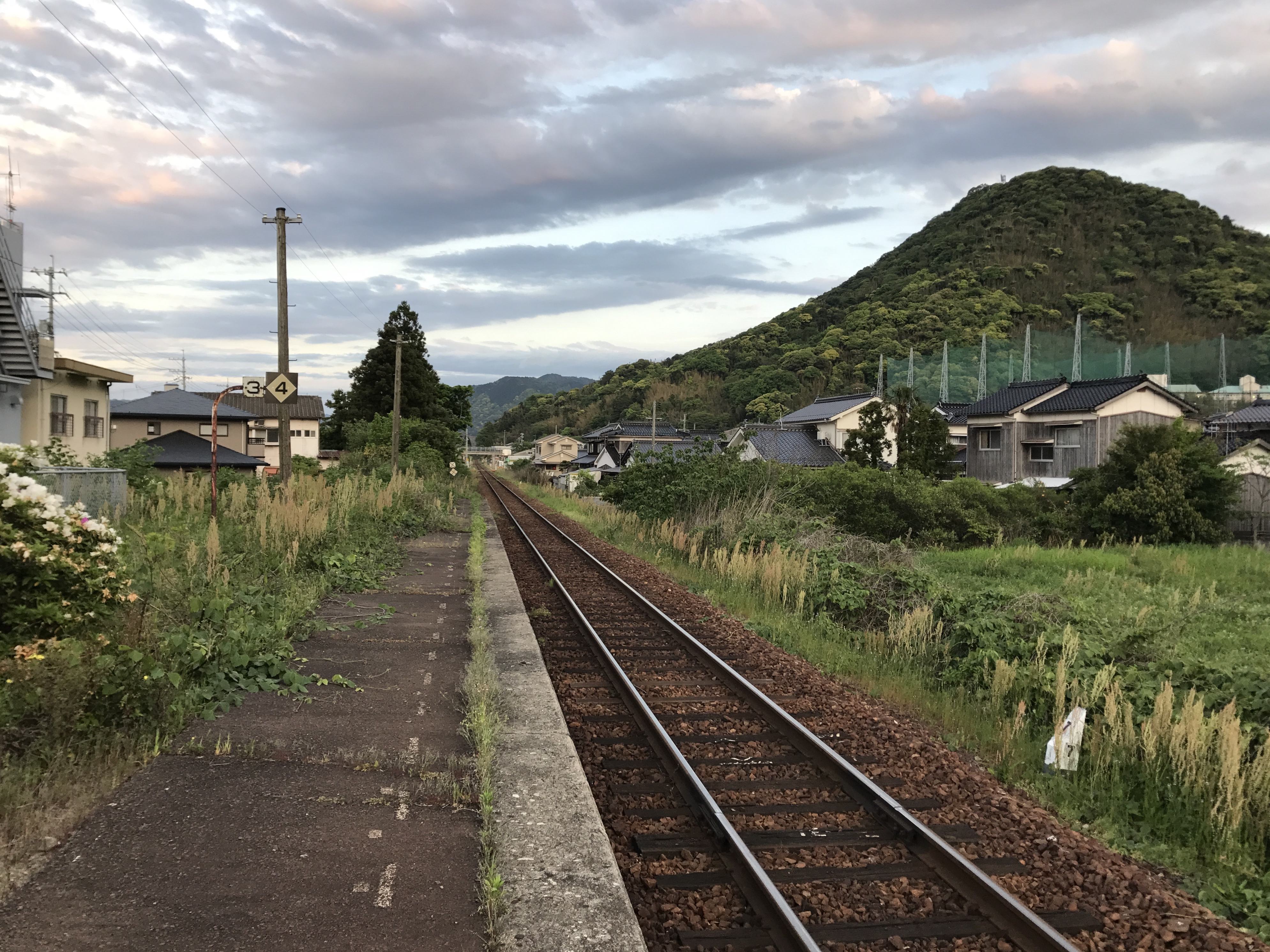 玉江駅のホーム(奥は萩方面)